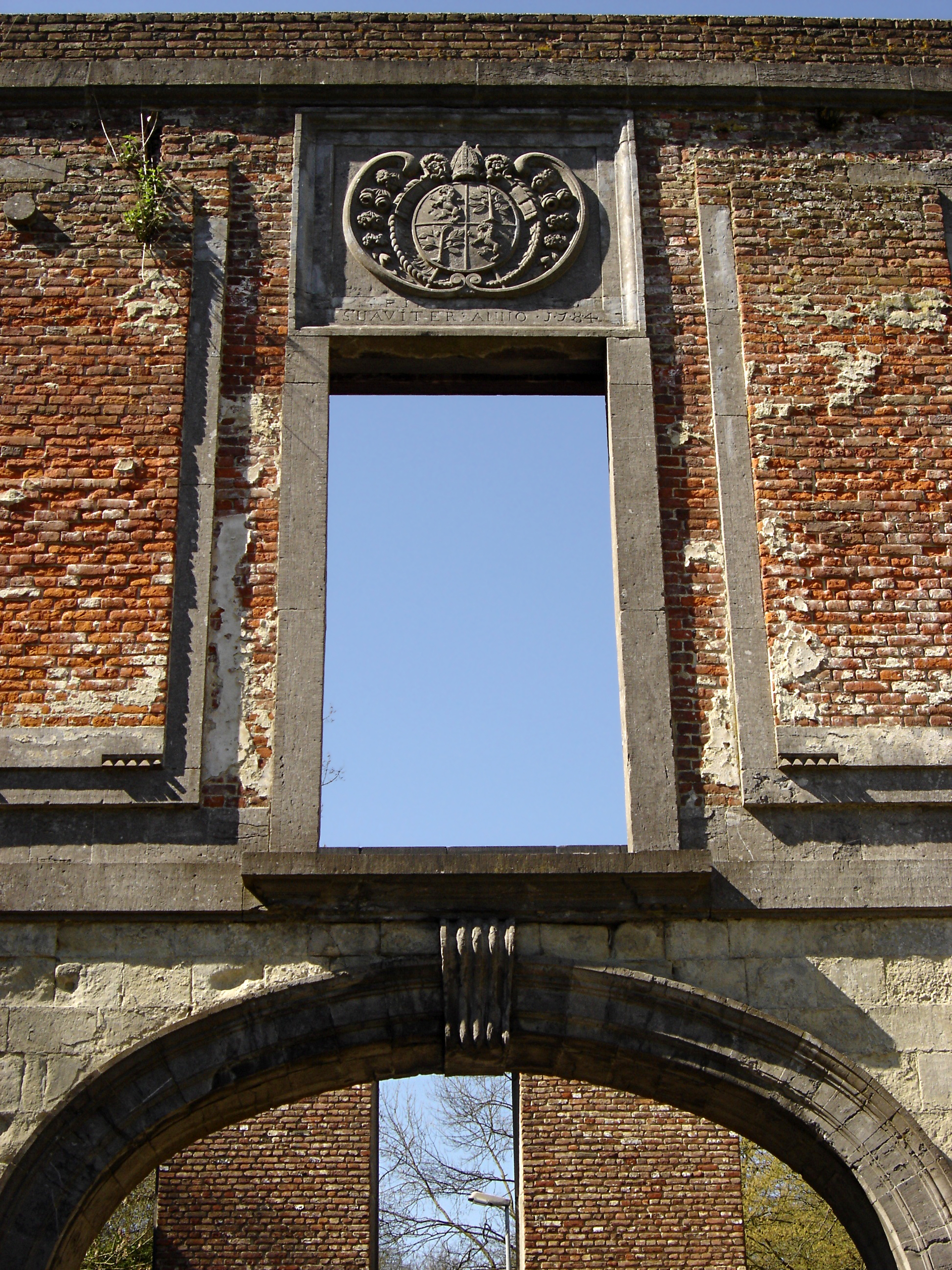 Belgique - Brabant wallon - Villers-la-Ville - ancienne pharmacie de l'Abbaye (photo 2007, avant l'effondrement de novembre 2013)